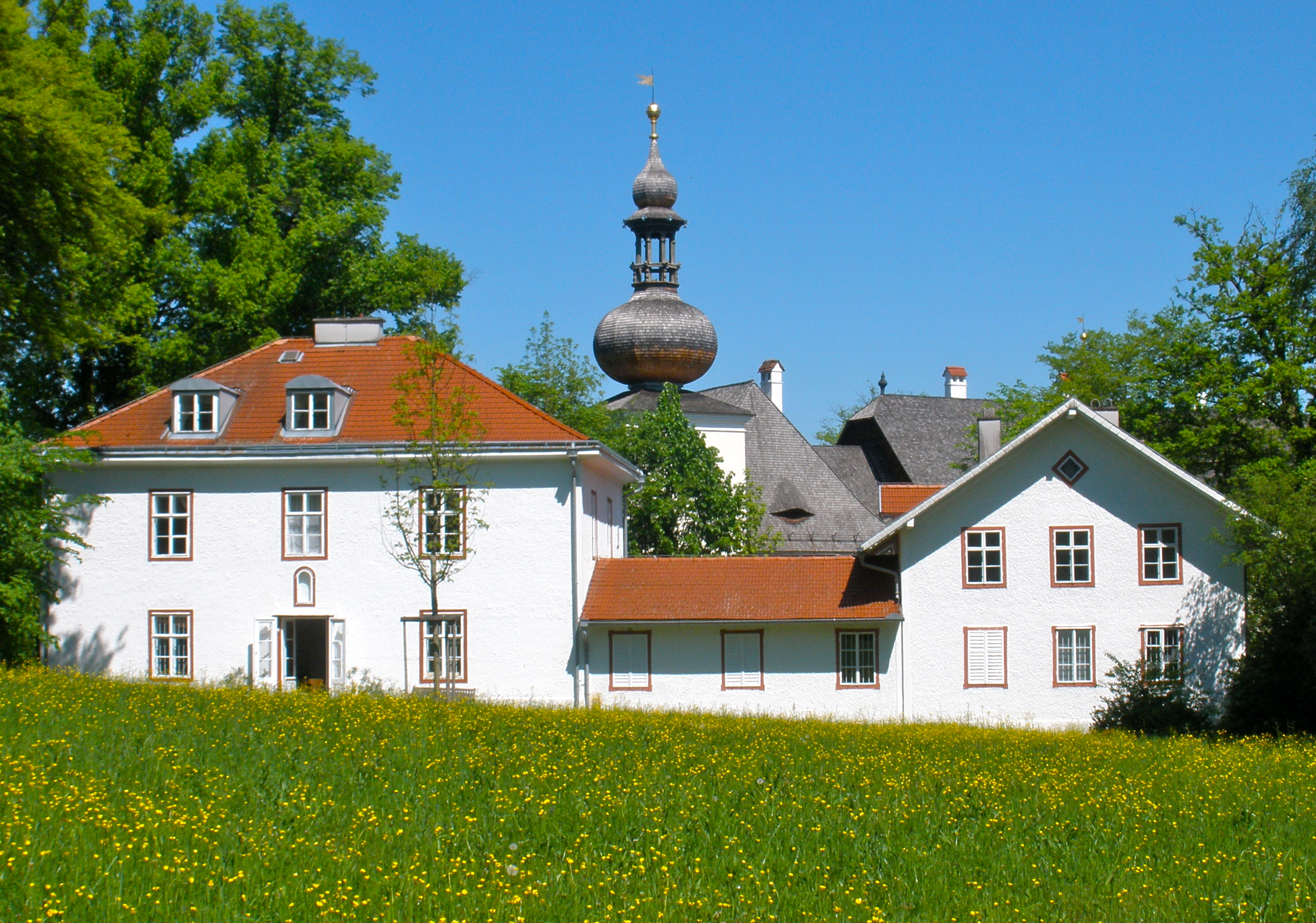 Die sogenannte "Kleine Villa Toscana" in Gmunden (Nähe Landschloss Ort) beherbergt das Thomas-Bernhard-Archiv.